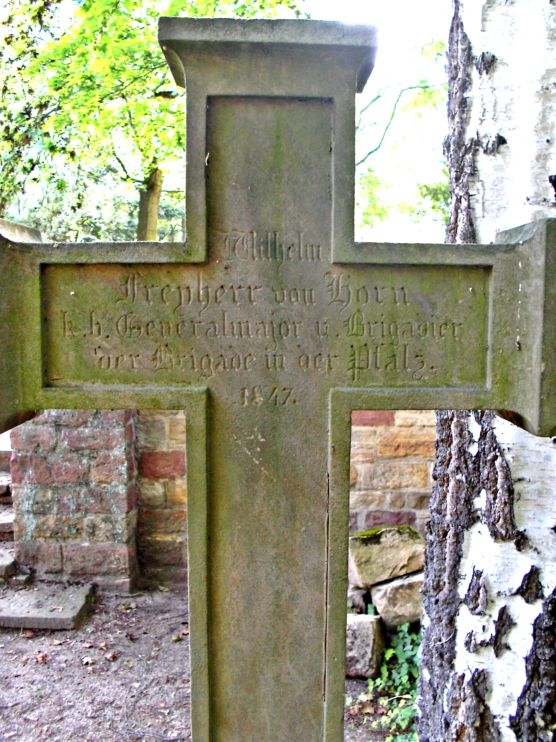 Grabstein bay. General Wilhelm von Horn (1784-1847), Alter Friedhof Speyer